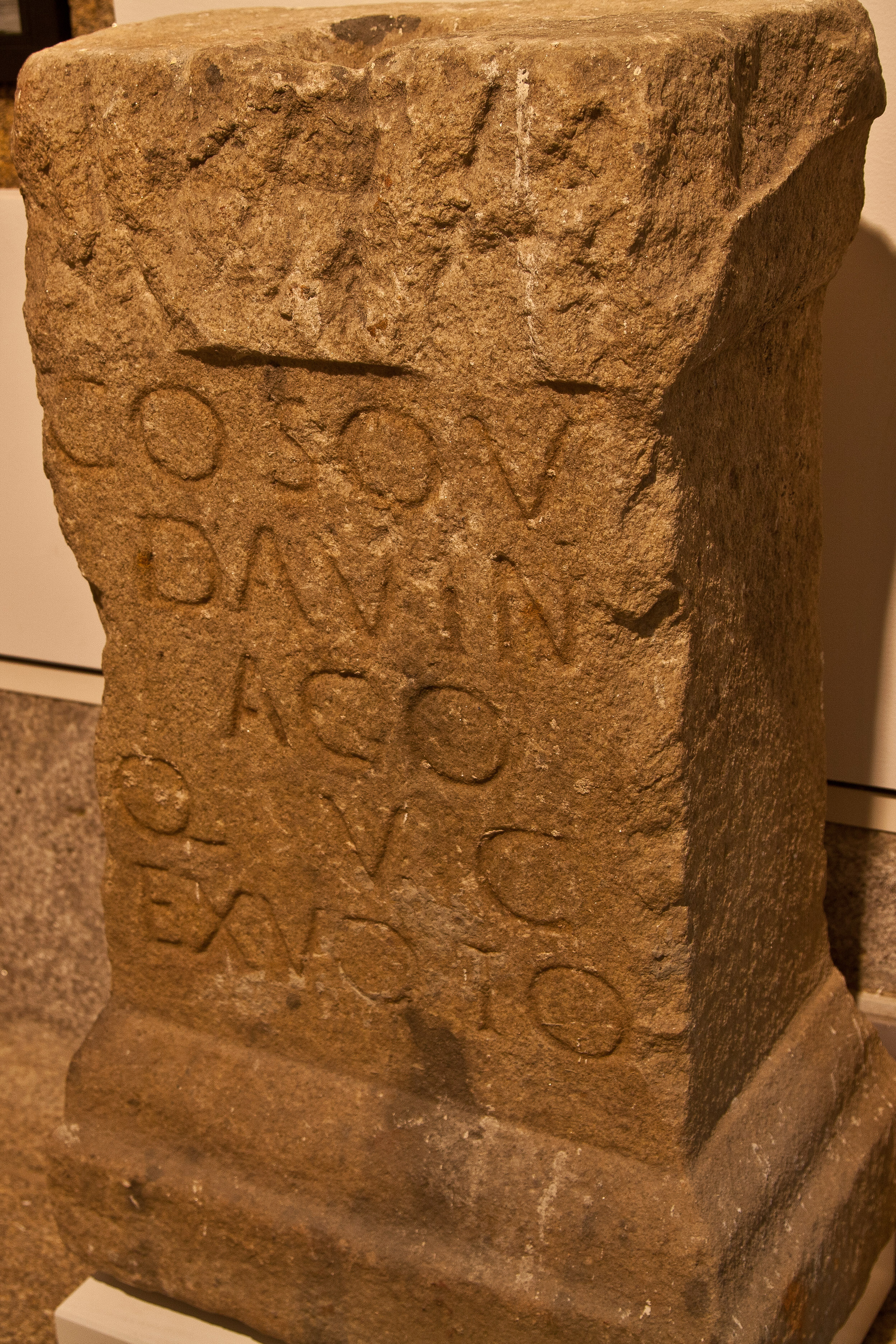 COSOV/ DAVINI/AGO/ Q V C / EX VOTO A Coso Udaviniago. Q(?), V (?) C (?) cumpriu o seu voto. Procedencia: Antiga igrexa parroquial de San Martiño de Meirás, Sada, A Coruña. NOMES GALAICOS, DIVINOS E HUMANOS Na antiga Gallaecia non se conservan textos na lingua propia. Os indíxenas só comezaron a usar a escrita a partir da conquista romana, como mostran os seus monumentos funerarios e votivos. Sen embargo, a través destes chegaron a nós moitos nomes persoais e divinos galaicos, datados a maioría en torno aos séculos II e III d.C., como os que se expoñen. Os deuses indíxenas aquí adorados, Lugoves e Coso, documéntanse noutras partes da Gallaecia e fóra dela. Os seus teónimos ou nomes divinos adoitan ir acompañados dun adxectivo en lingua indíxena, como Arquienos e Udaviniago. Estes indicarían a relación do deus con algún poder, área de influencia ou lugar xeográfico concreto, pero descoñecemos os seus significados. Sobre o deus Coso, de ampla extensión no noroeste peninsular, discútese o seu carácter guerreiro, fluvial, protector de comunidades... Sobre os Lugoves, sabemos que se trata do deus supremo dos celtas Lugus, expresado na ara por tres foculi -orificios de ofrendas-, como os que tamén vemos nas aras dos Lares Viales.